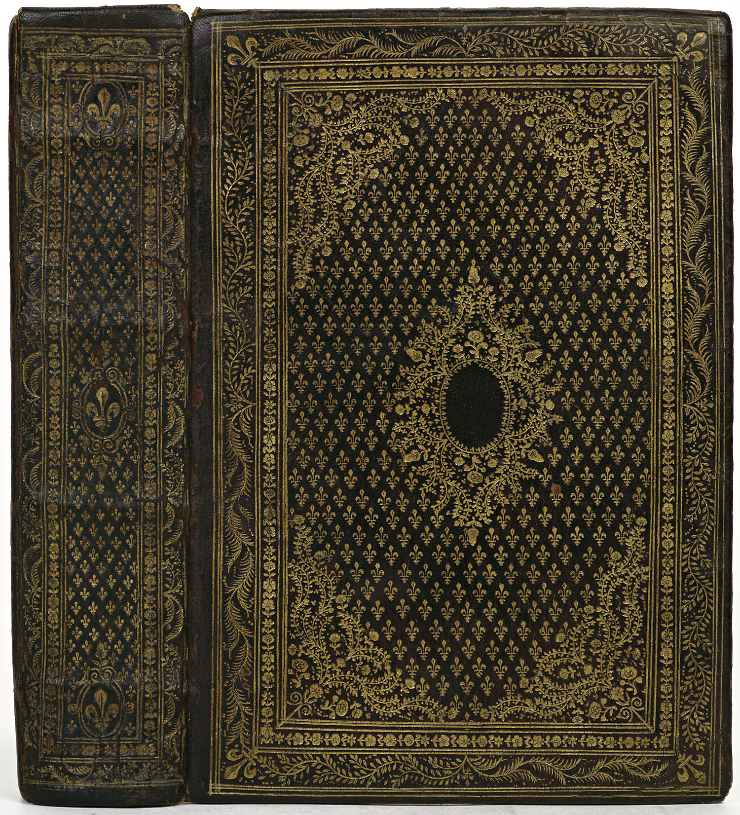 Inhoud: Mythologie, c'est à dire, explication des Fables ... Extraite du Latin de Noël le Comte, & augmentée ... Par I.D.M. A Lyon, chez Pavl Frelon, 1600. 4to.